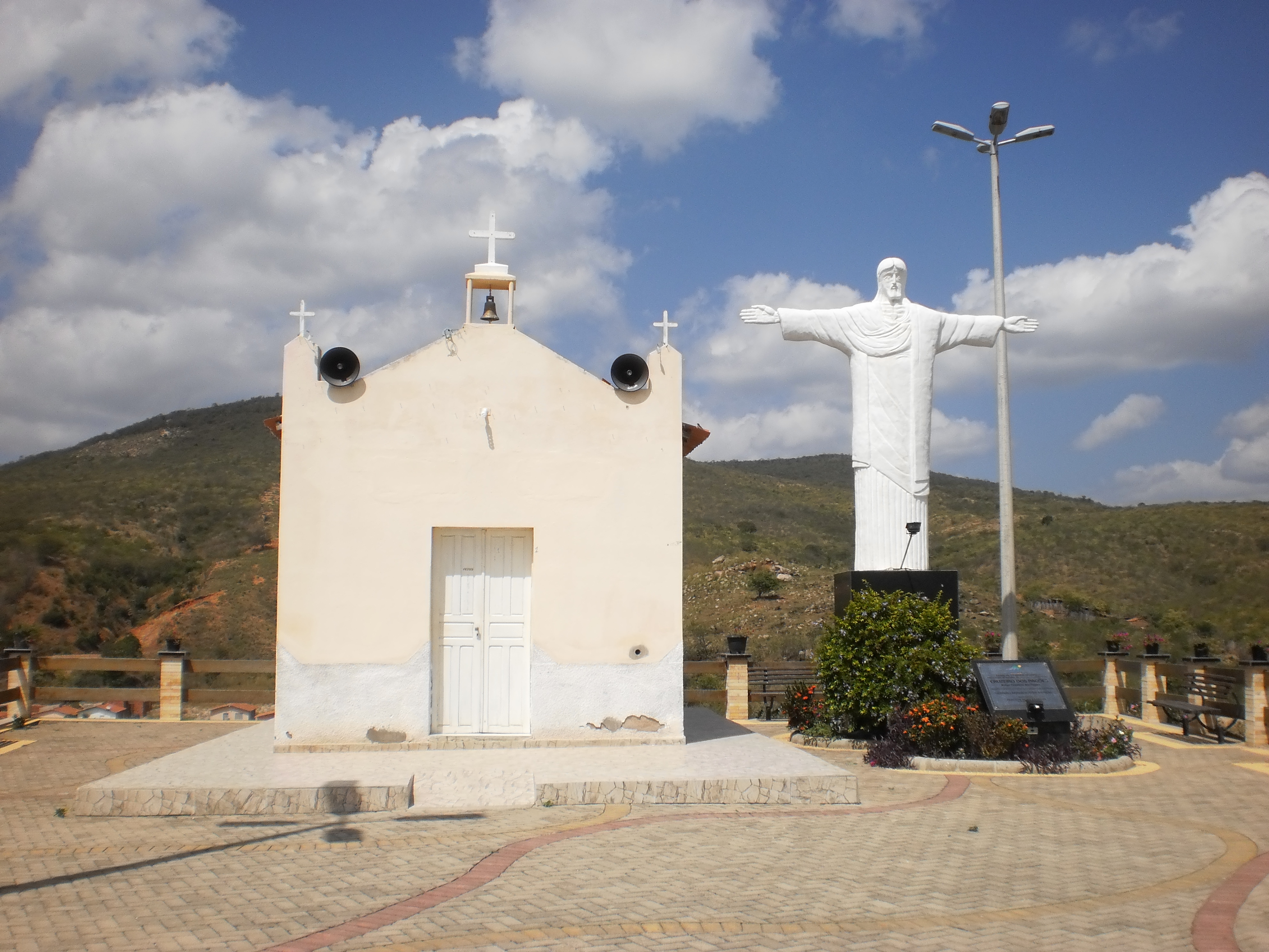 Capela de São Francisco e Cristo-Rei, no Cruzeiro dos Pagãos - Coronel João Pessoa, Rio Grande do Norte, Brasil.